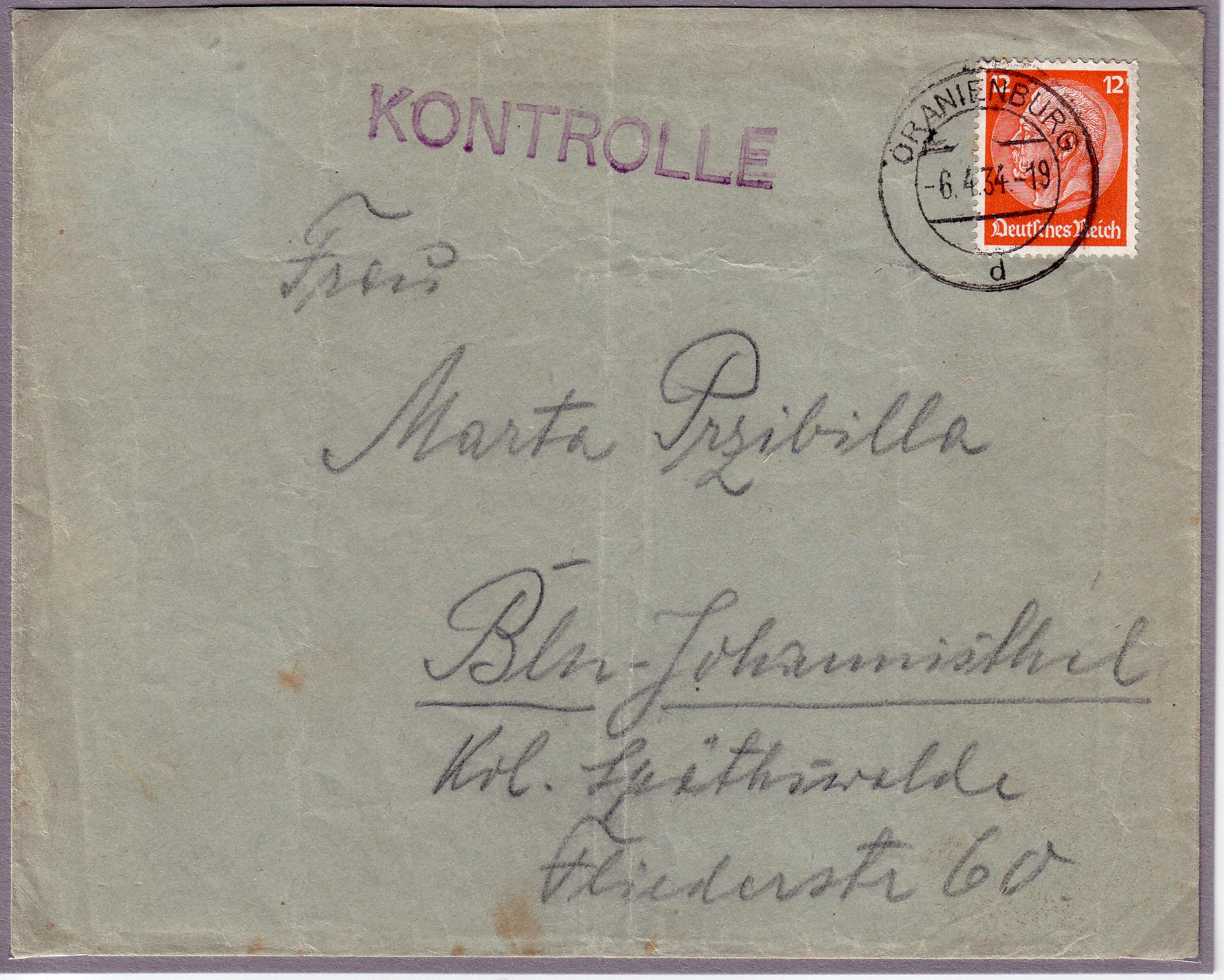 Brief eines Häftlings aus dem KZ Oranienburg von 1934 Zensurstempel: "Kontrolle" Poststempel: "Oranienburg, 6.4.1934